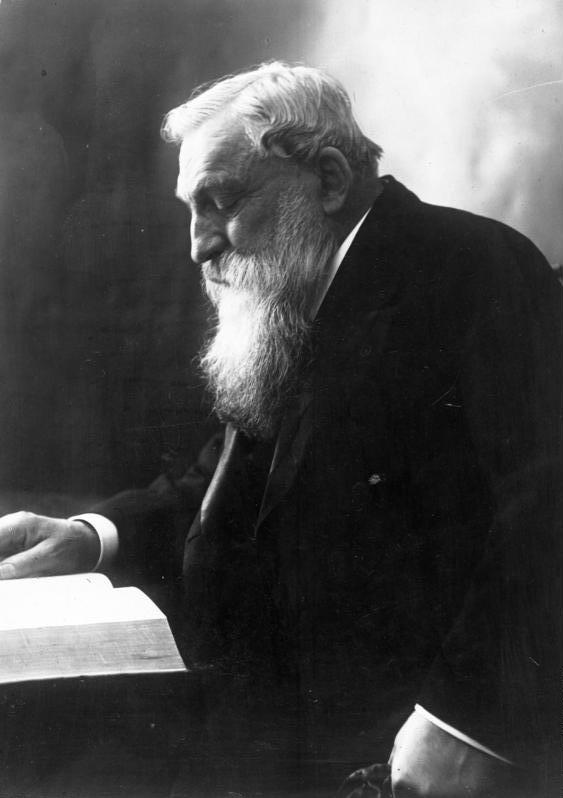 Auguste Rodin Zentralbild Auguste Rodin, französischer Bildhauer, Maler und Radierer, geb.: 12.11.1840 in Paris, gest.: 17.11.1917 in Meuden, Begründer einer impressionistischen Plastik. (Aufnahme 1914) 2075-14 Abgebildete Personen: Rodin, Auguste: Bildhauer, Maler, Radierer, Frankreich